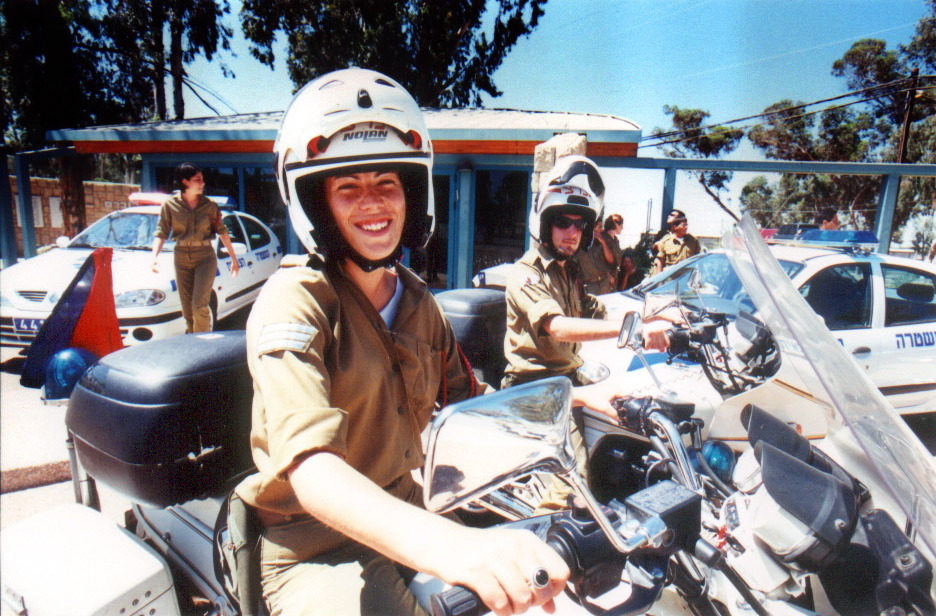 June 13, 2001. Dozens of military police celebrate the end of their training with an elaborate ceremony with then-Chief of the General Staff, Lt. Gen. Shaul Mofaz, then-Chief of the Military Police Corps, Brig. Gen. Yoram Zachor, officers from the corps and their families. עשרות שוטרים צבאיים חוגגים את סוף ההכשרה שלהם בטקס מיוחד במעמד הרמטכ"ל דאז, רא"ל שאול מופז, קצין משטרה צבאית ראשי דאז, תא"ל יורם צחור, קצינים מהחיל ומשפחותיהם.